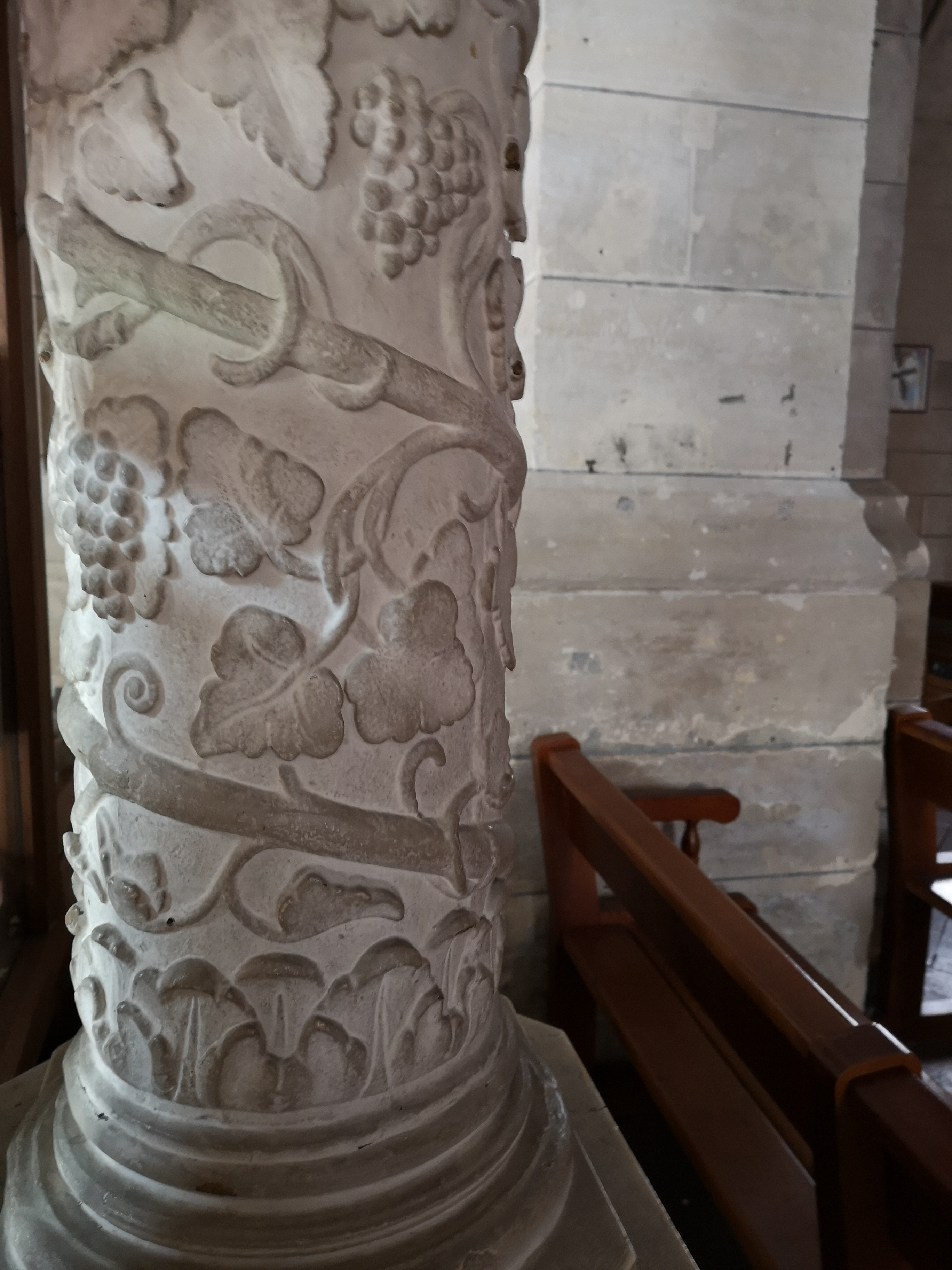 déco d'un pilier de l'église de Houilles